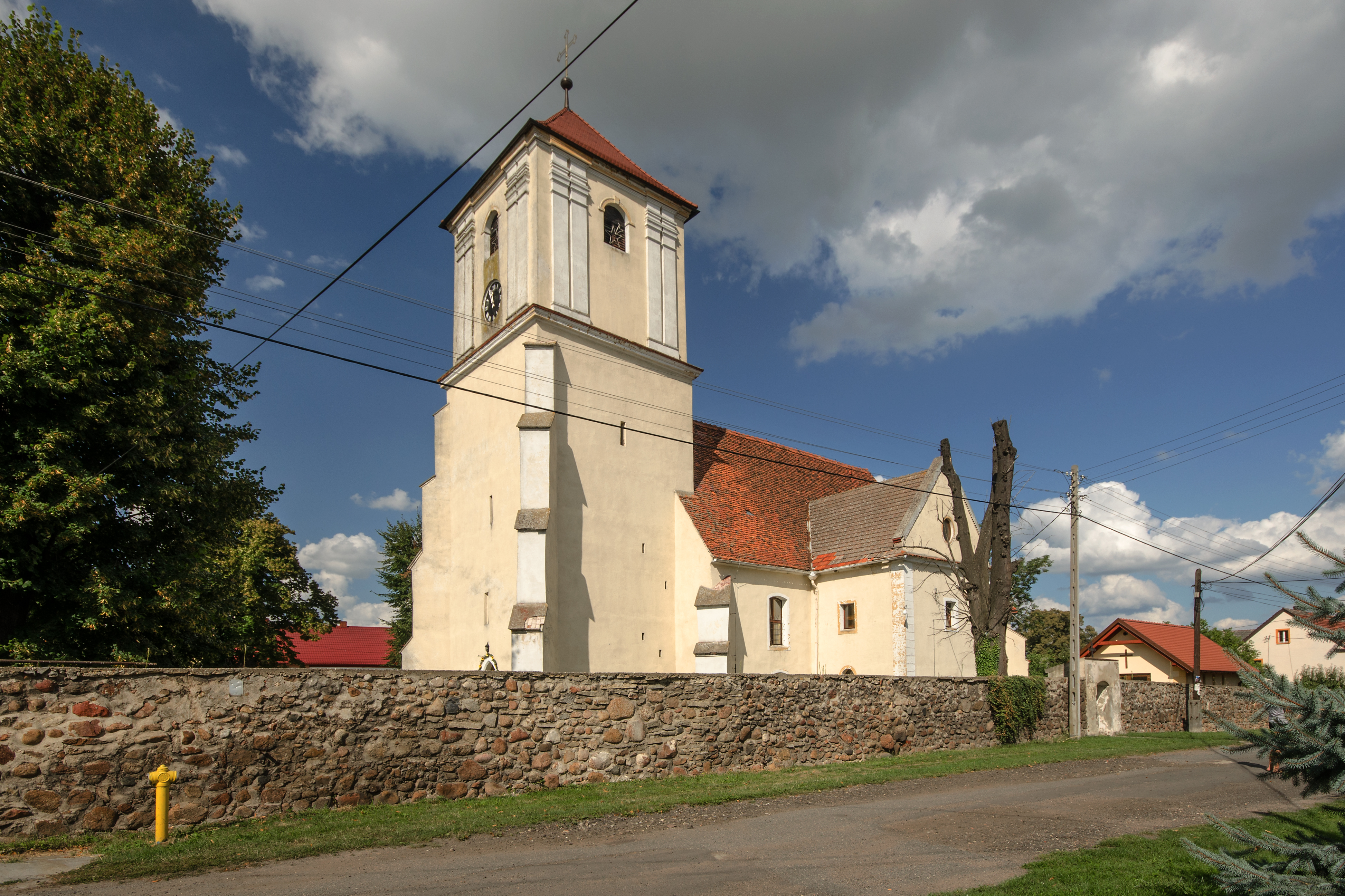 Przylesie, kościół fil. p.w. św. Stanisława Kostki, poł. XIV, 1712-1713, 1875